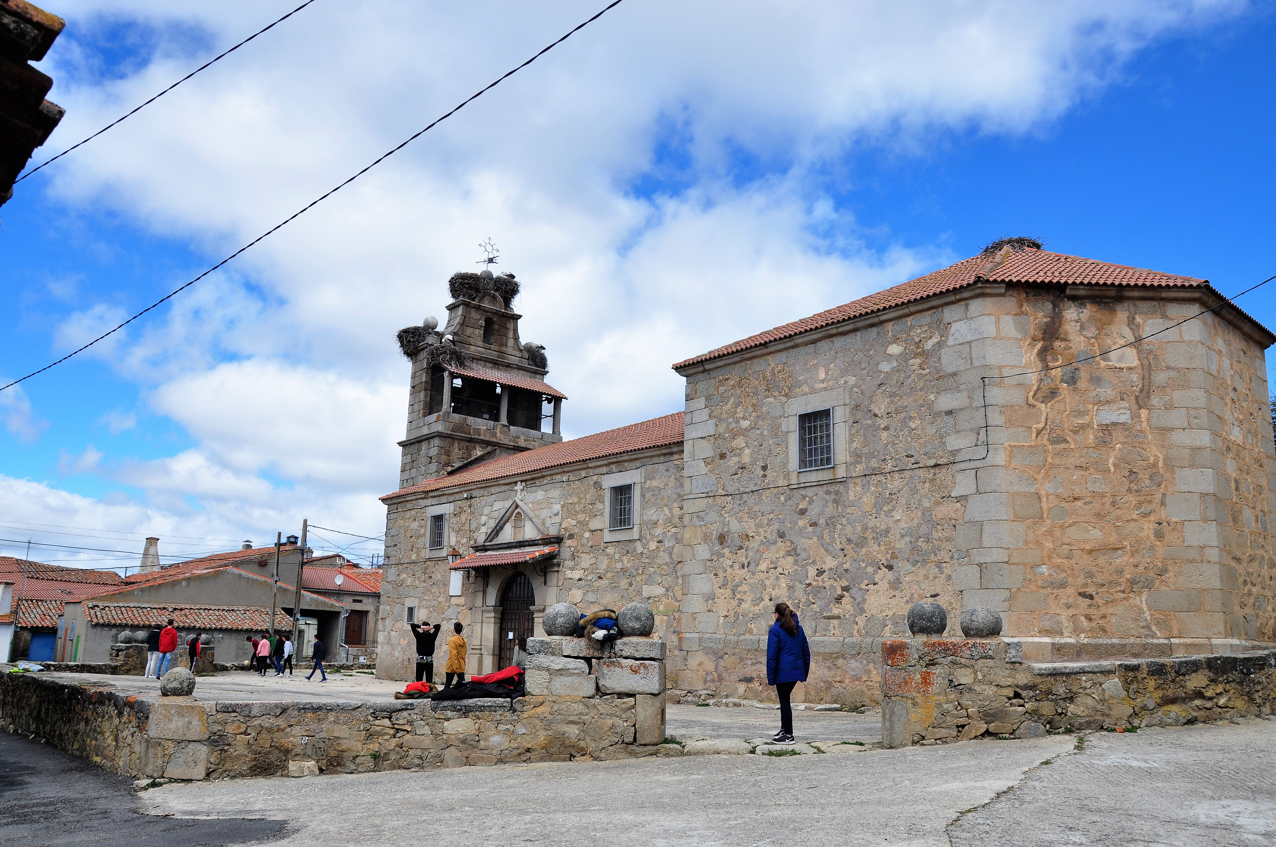 Iglesia parroquial de Arevalillo, Ávila, España